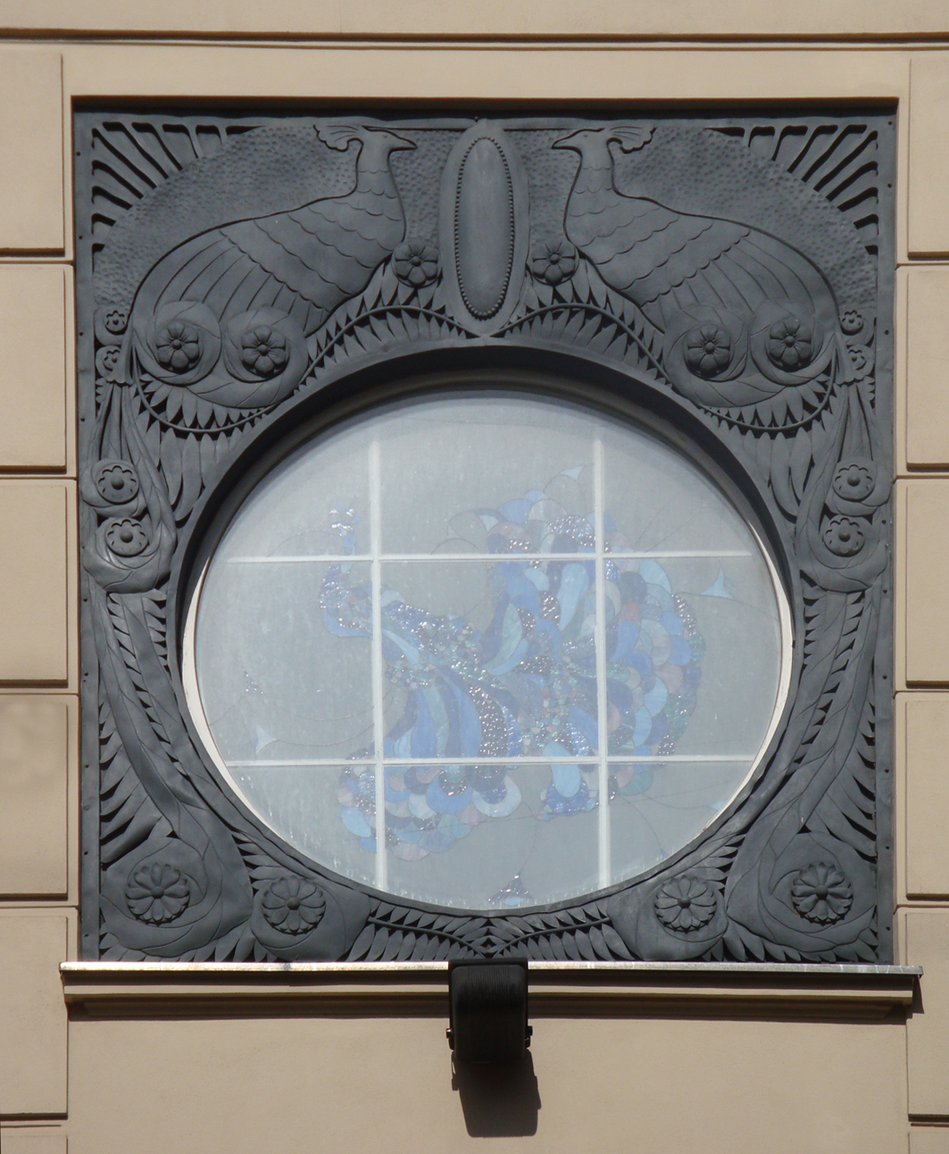 Secesyjne okno Hotelu Savoy w Łodzi przy ul. Traugutta